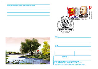 Почтовая карточка Беларуси с оригинальной маркой, посвященная 100-летию со дня рождения Ф. С. Пестрака (2003).